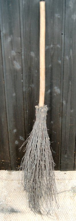 „Rutenbesen“, Besen aus Reisig